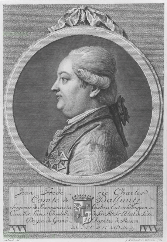 Jean Frederic Charles Comte de Dallwitz, Seigneur de Koenigswarta, Caslau, Eutrich, Truppen etc.